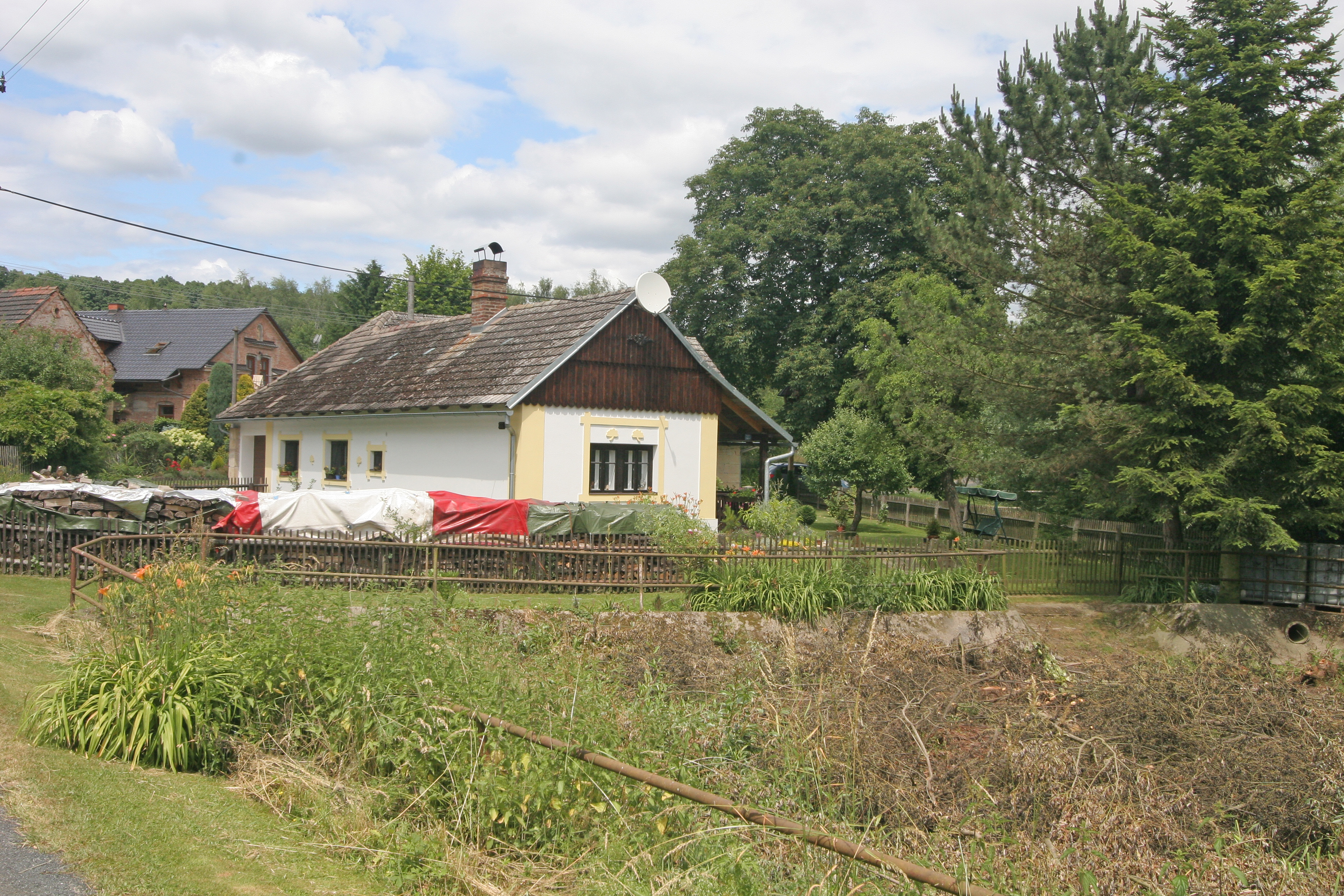 Lhota čp 55